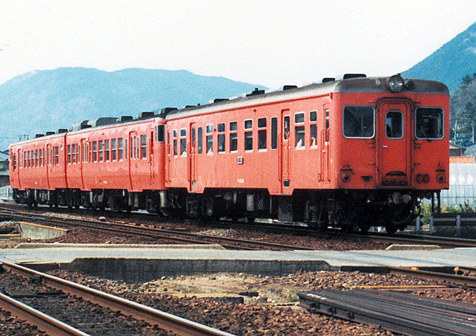 国鉄キハ20 32+キハ47×2